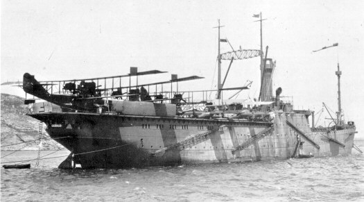 Portahidroaviones español Dédalo fondeado en el puerto de Cartagena.